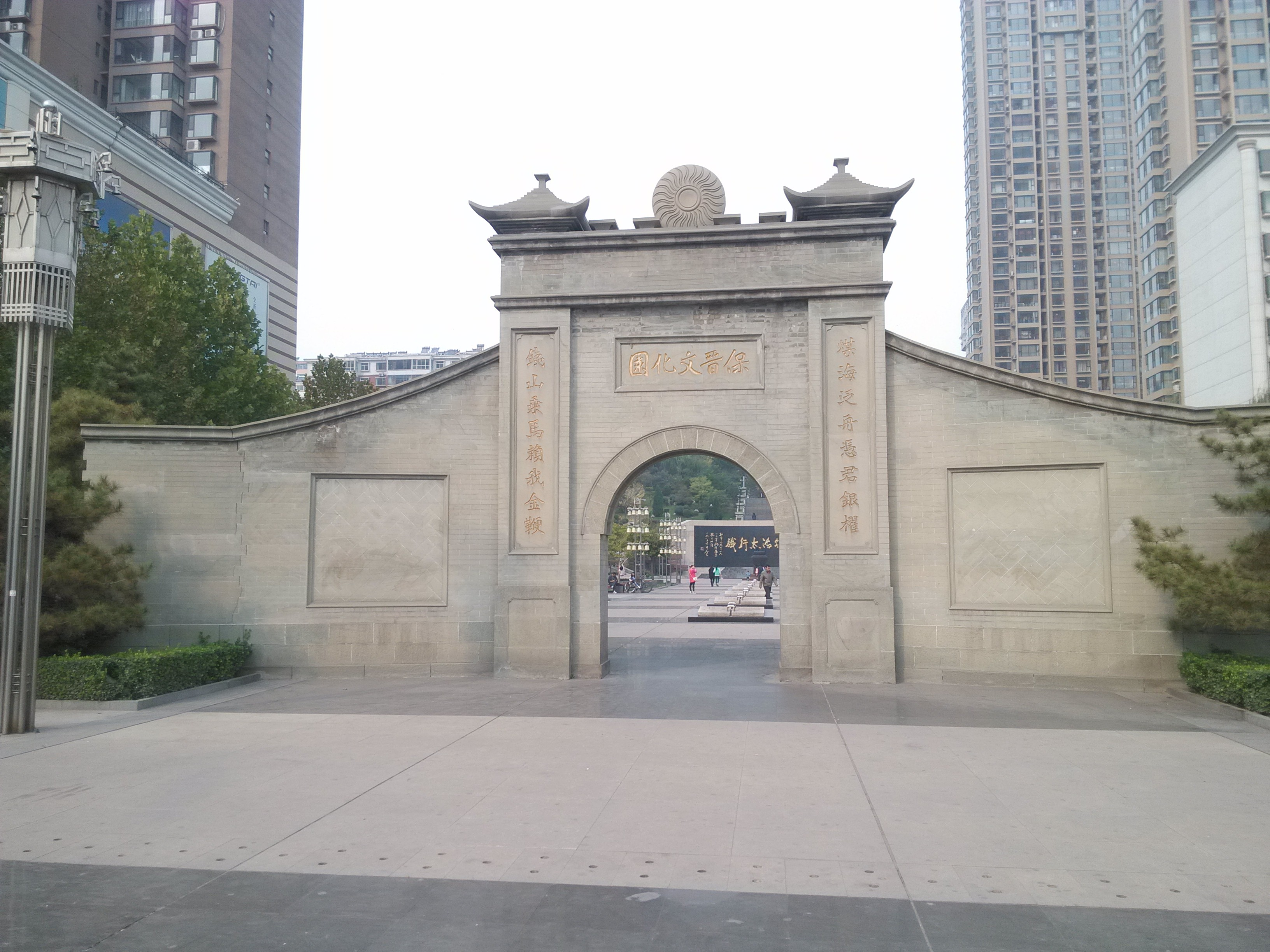 保晋文化园南门